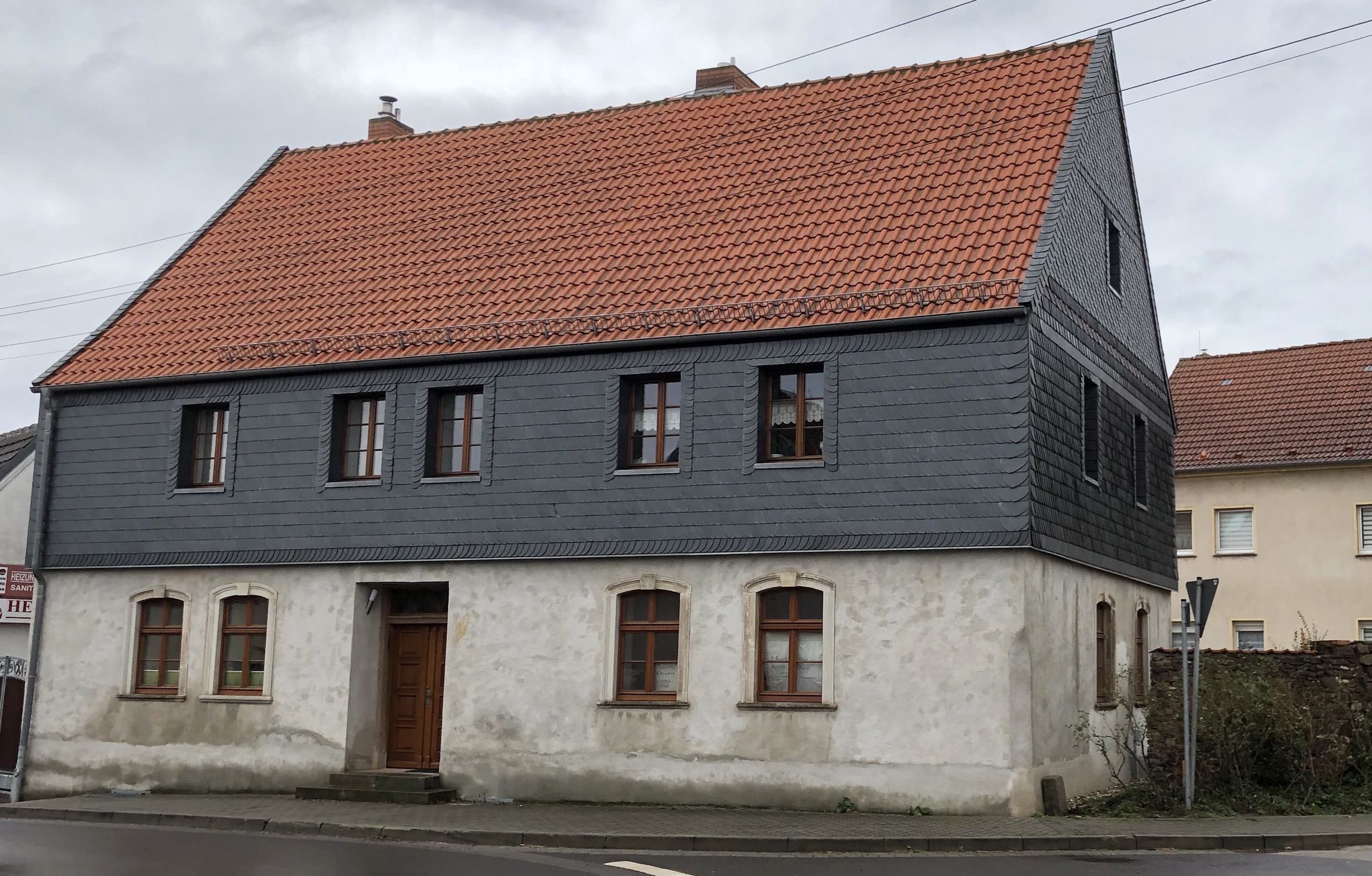 Dahlenwarslebener Straße 1 Hohenwarsleben